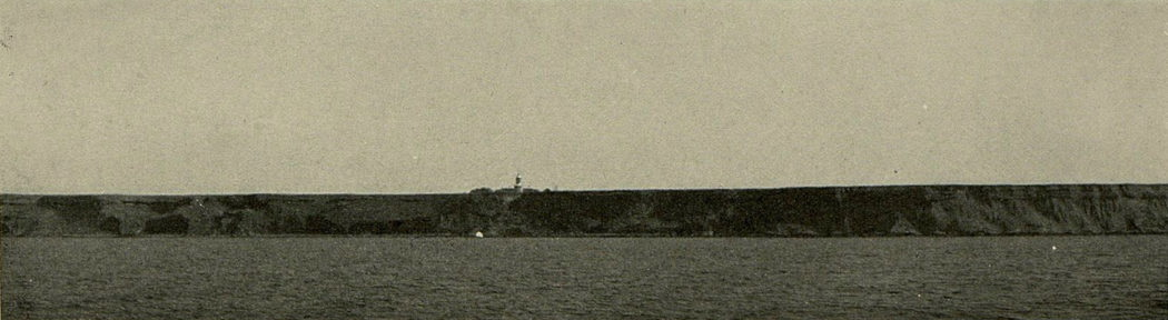 Мыс Чауда и Чаудинский маяк, С. Яковлев "Лоция Черного и Азовского морей". С.-Пб., 1903